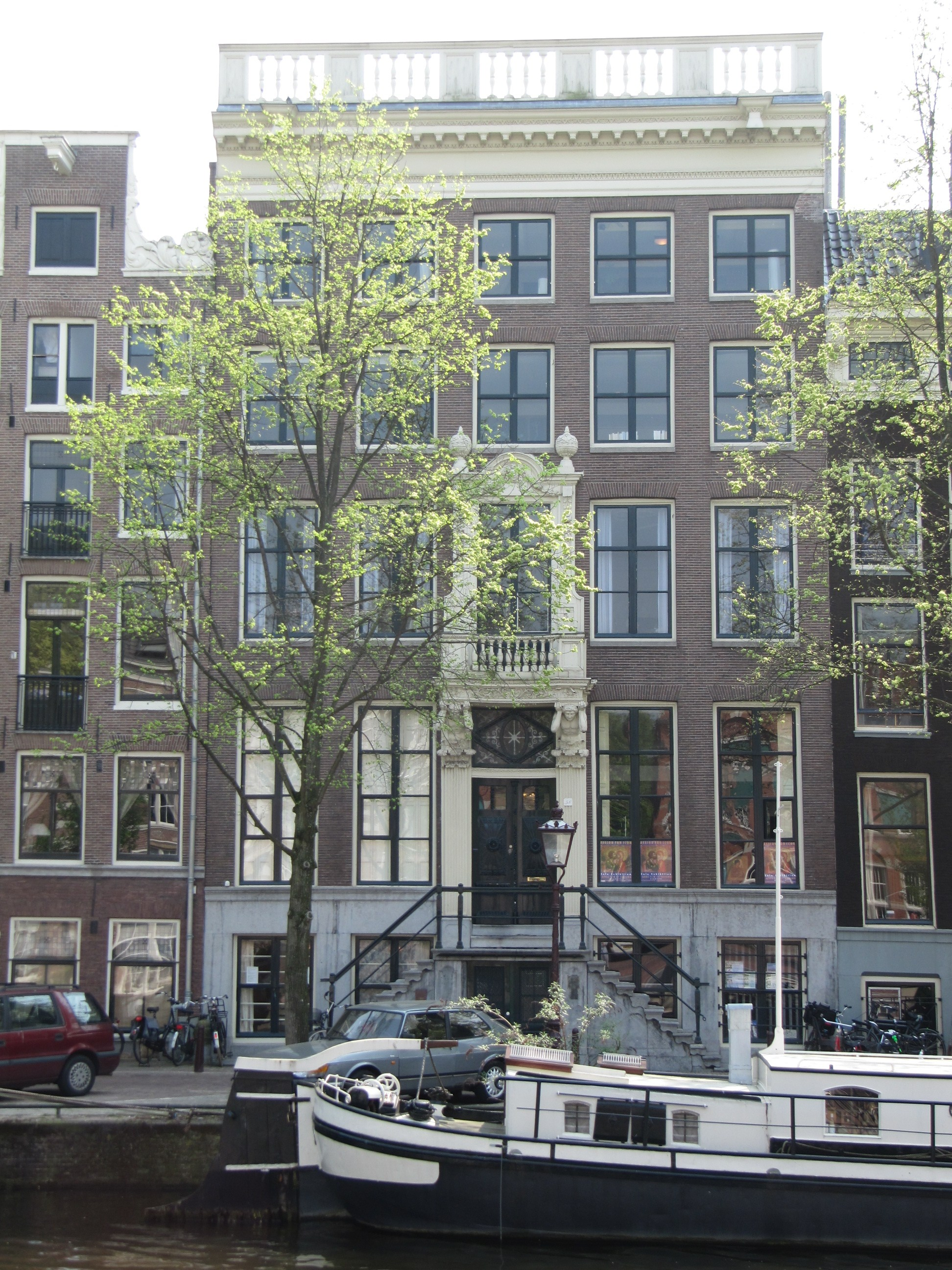 RM2796 Amsterdam - Nieuwe Keizersgracht 58.jpg